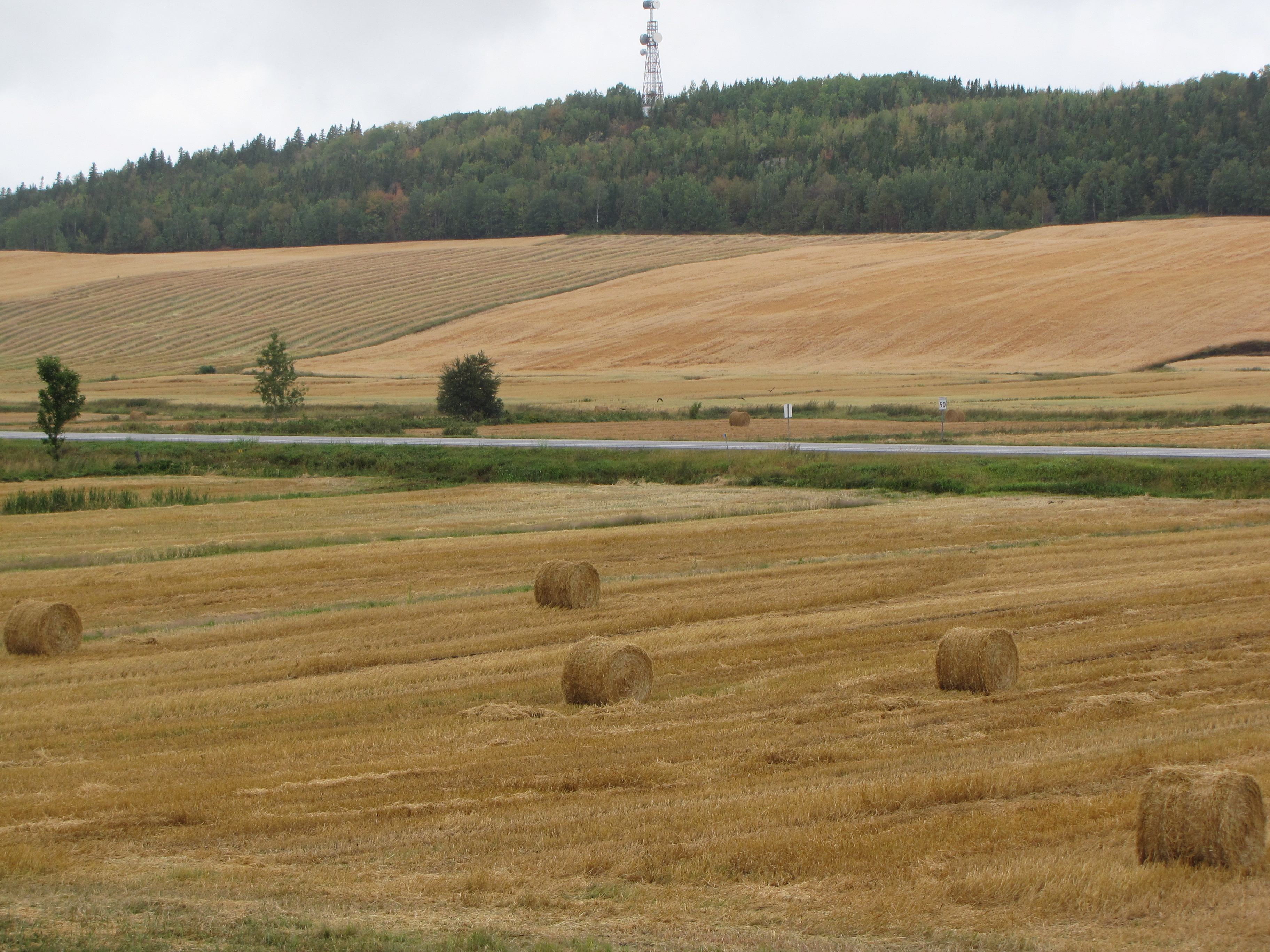 BALLOTS DE PAILLE, APRÈS LA RÉCOLTE DE L'AVOINE